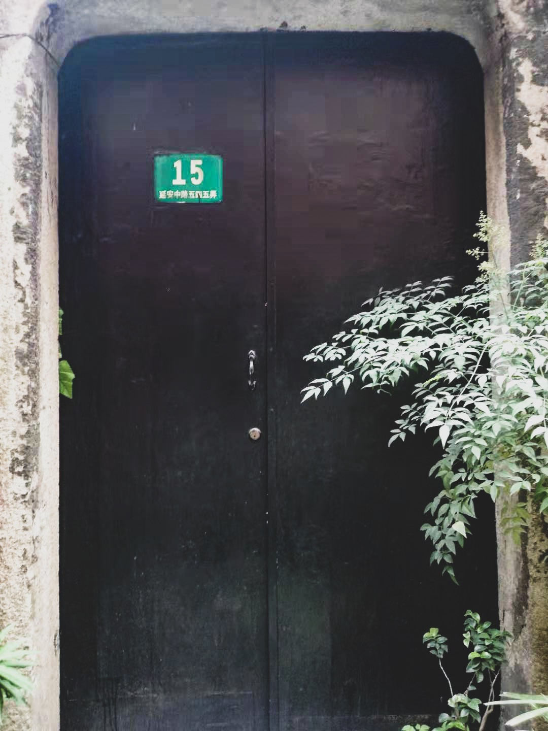 中文（中国大陆）: 国务院总理李鹏出生地